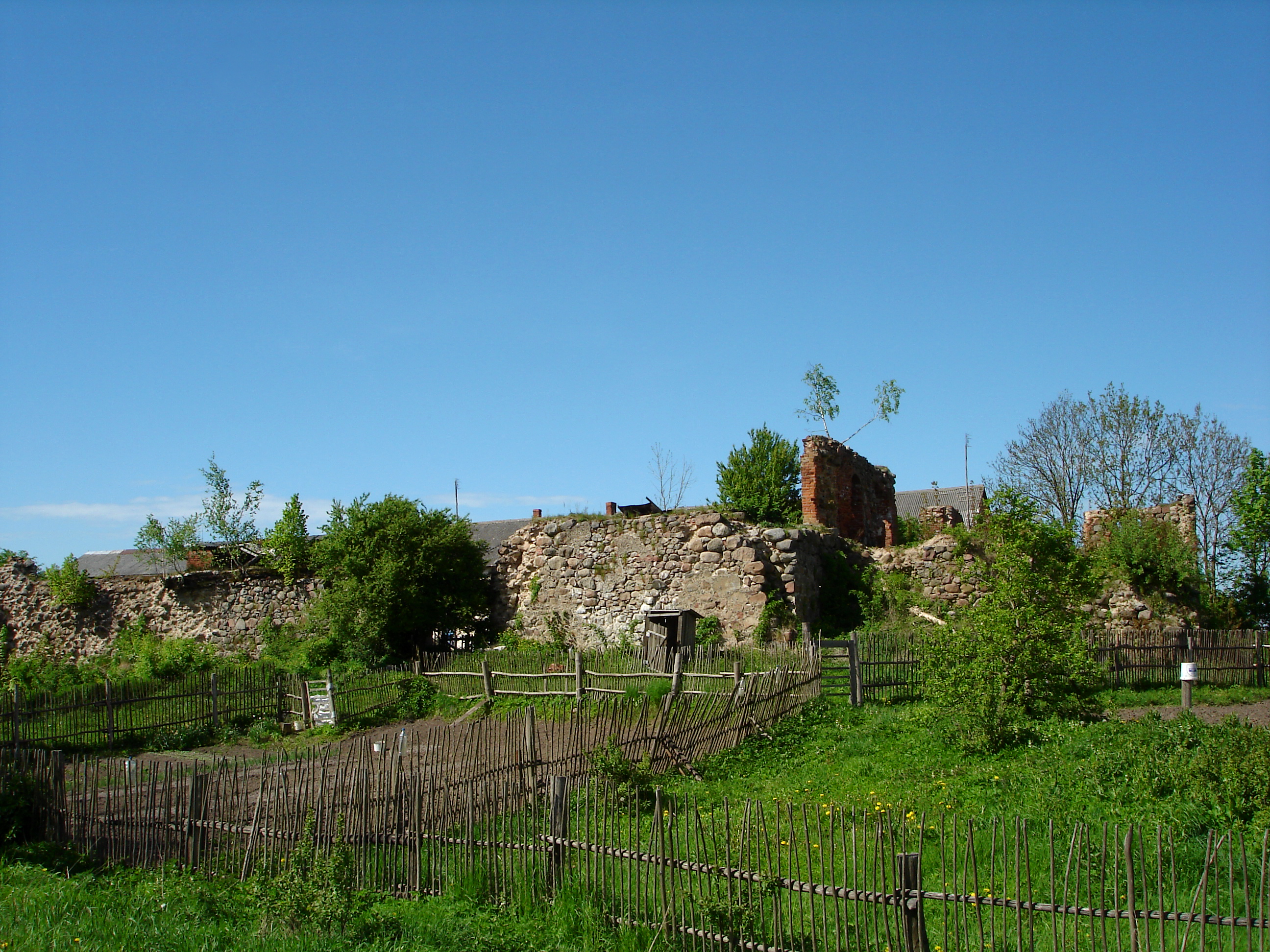 Talpaki/Taplacken oblast kaliningrad